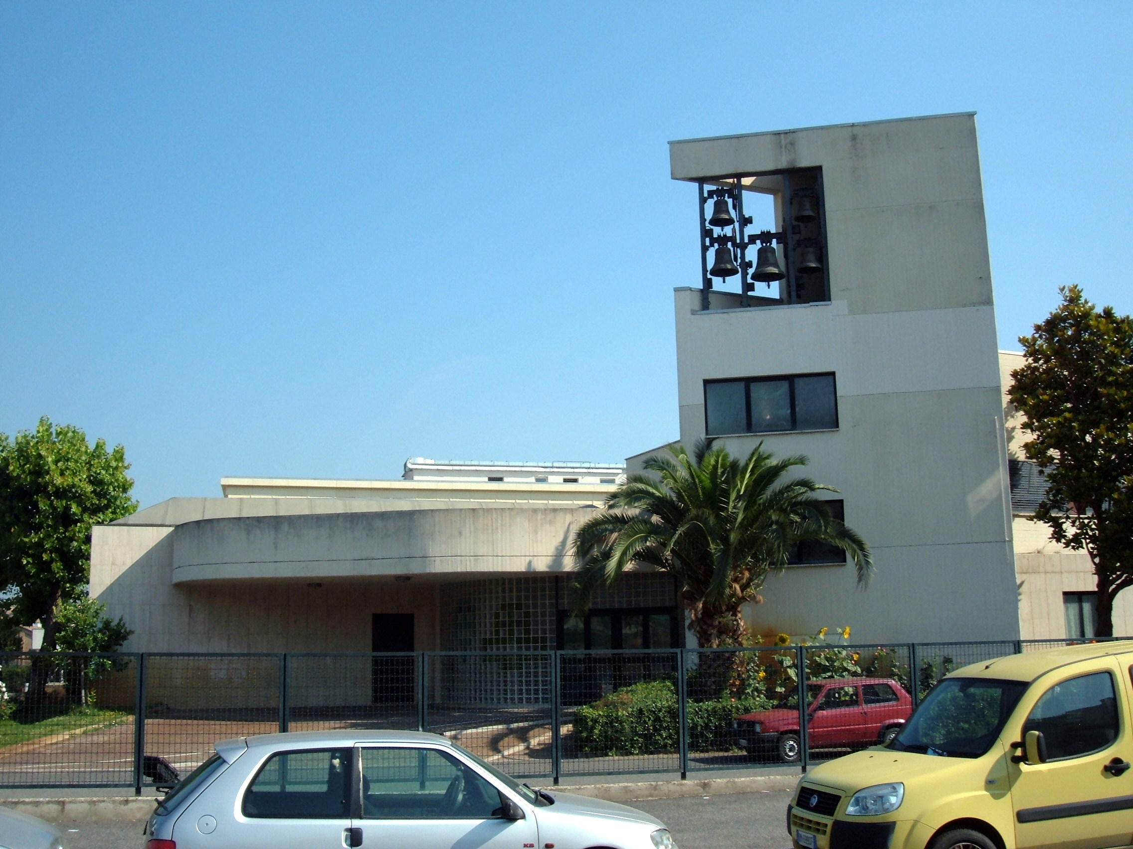 Chiesa dei Santi Aquila e Priscilla, a Roma, nel quartiere Portuense.